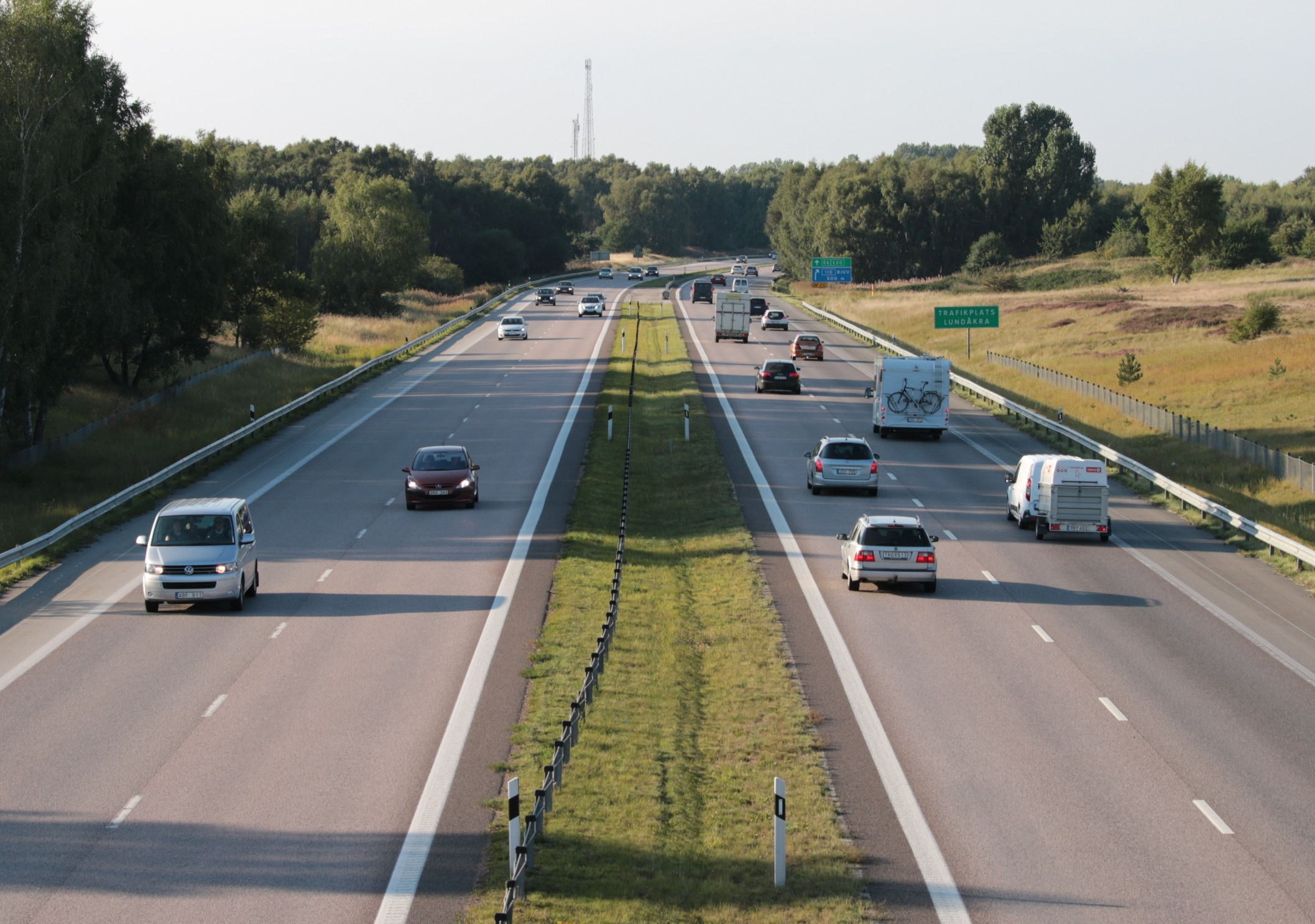 E6 vid Järavallen, Skåne